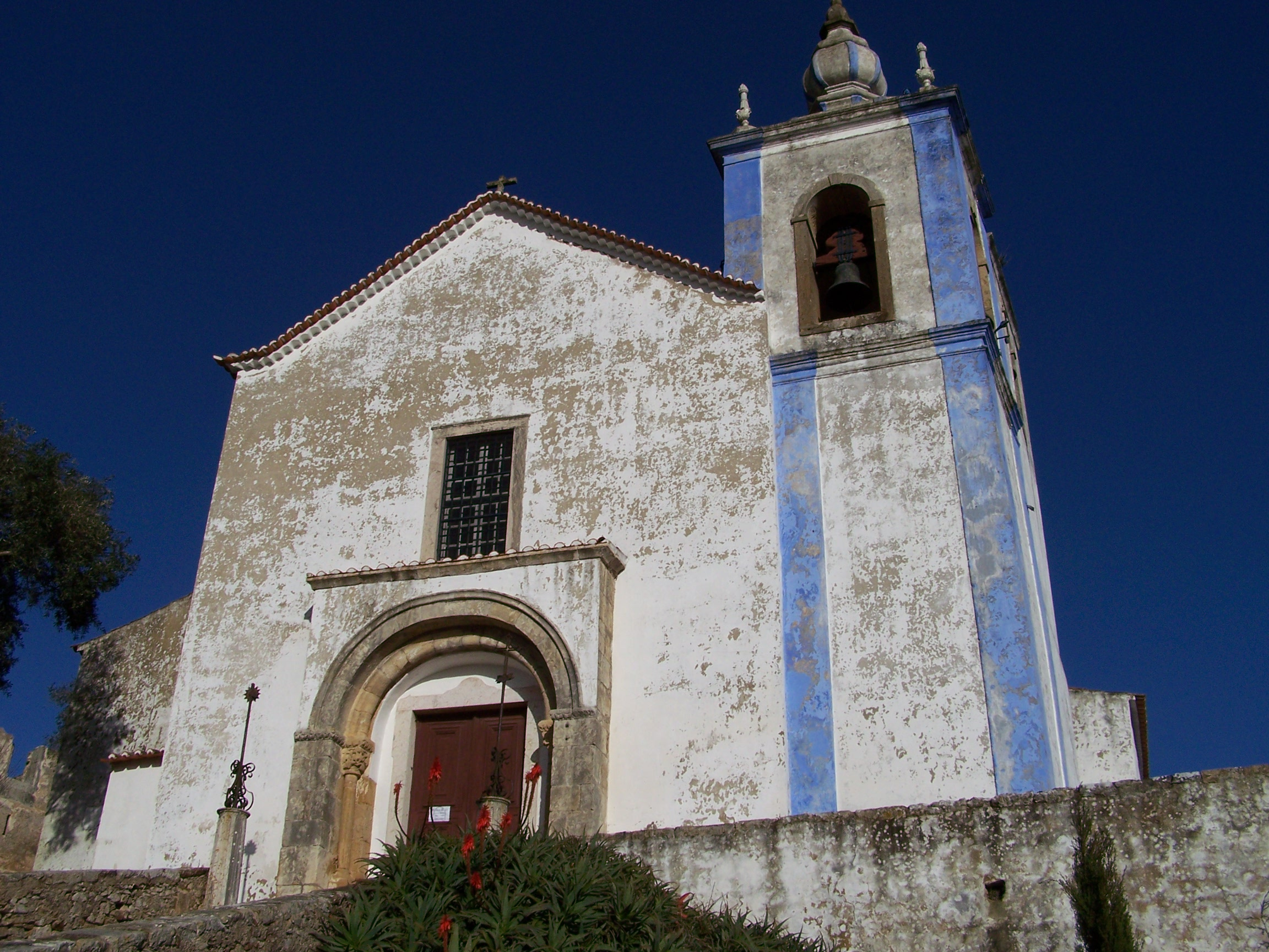 Igreja de Santa Maria do Castelo, situada dentro do Castelo de Torres Vedras.